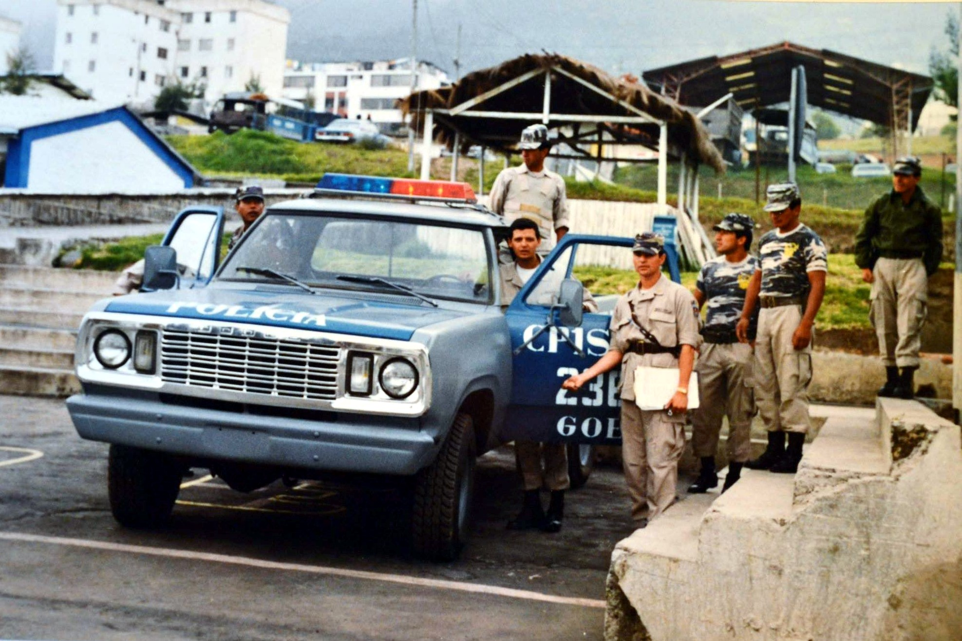 1992 - Personal del Grupo de Operaciones Especiales "GOE" - Regimiento Quito No.1 - Policia Nacional del Ecuador